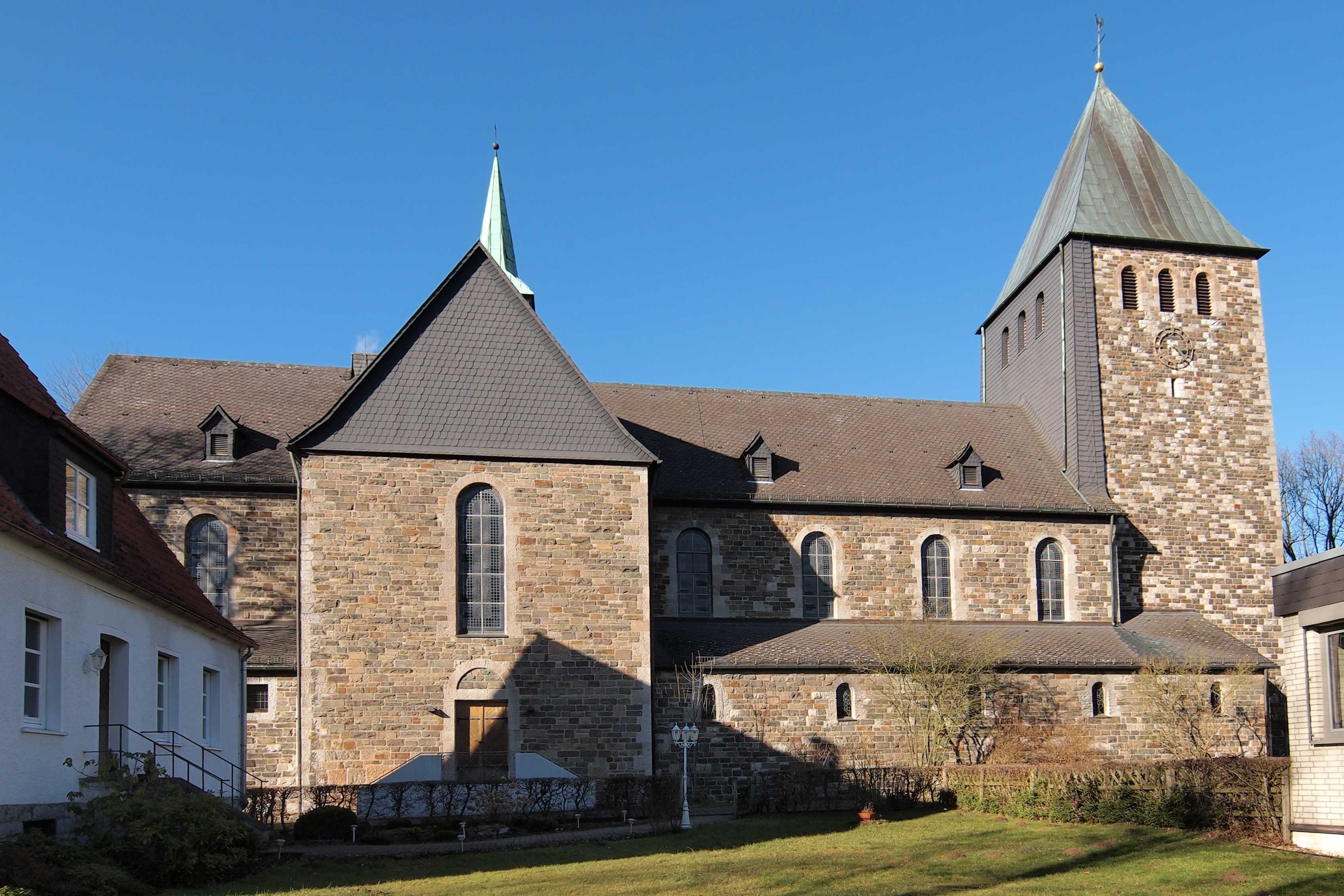 Niederense, katholische Kirche Sankt Bernhard, Südseite